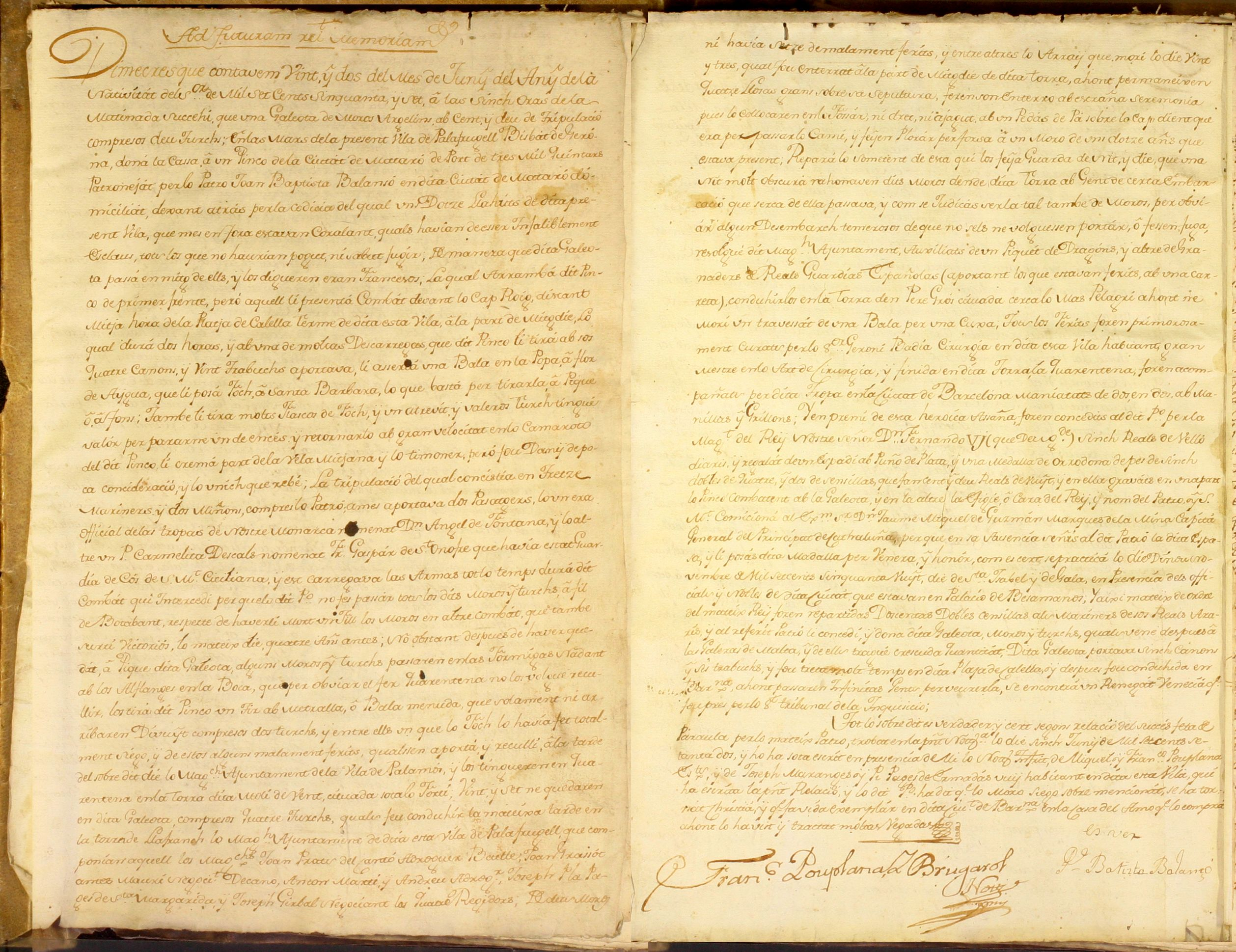 Acte notarial que alerta de pirates a les costes de Cap Roig de Palafurgell el 1772